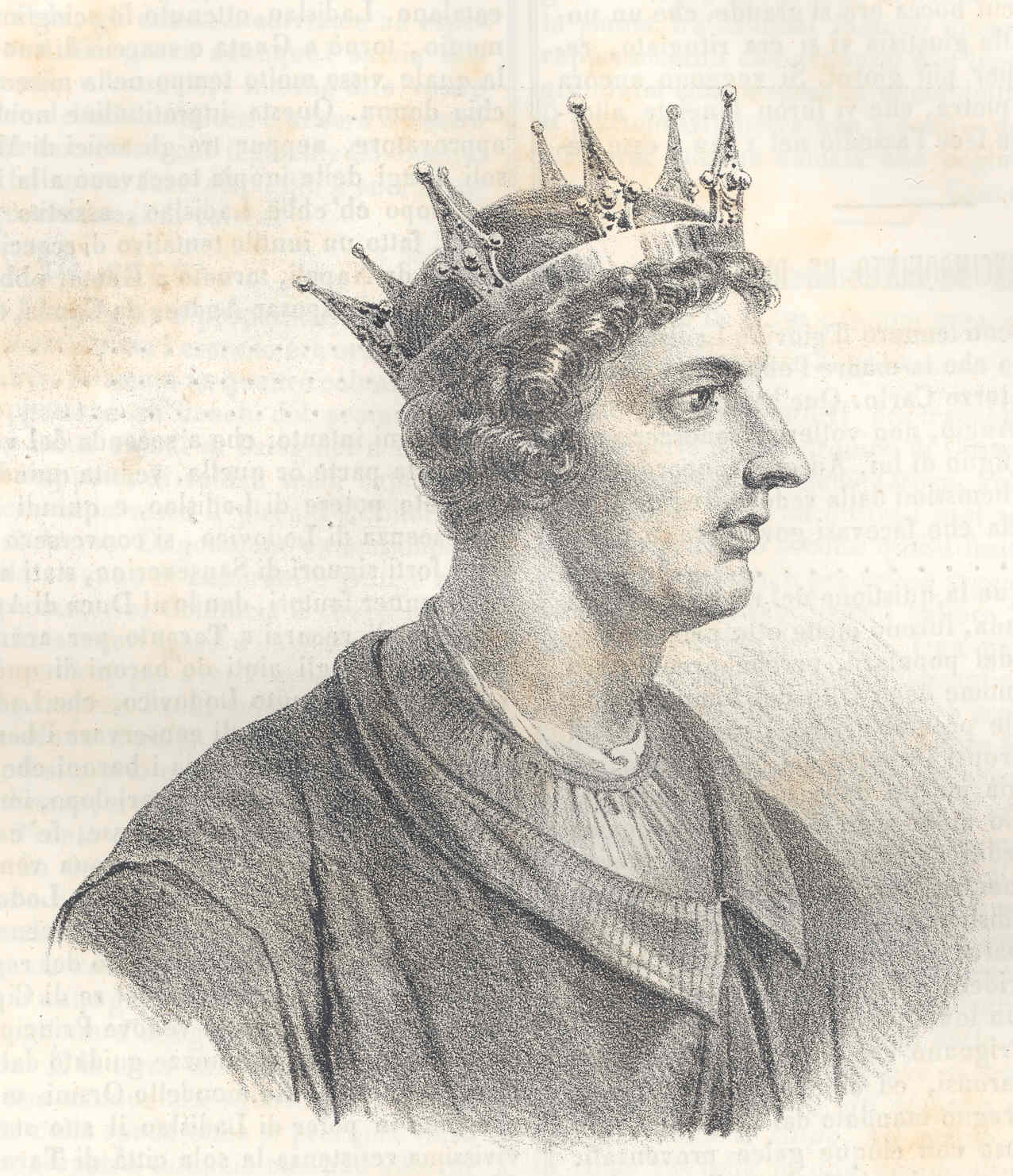 Ladislas d'Anjou-Durazzo le Magnanime, né à Naples le 11 juillet 1376, mort à Naples le 6 août 1414, roi de Naples de 1386 à 1414 et roi de Hongrie en 1403, fils de Charles III d'Anjou-Durazzo, roi de Naples et de Hongrie, et de Marguerite d'Anjou-Durazzo